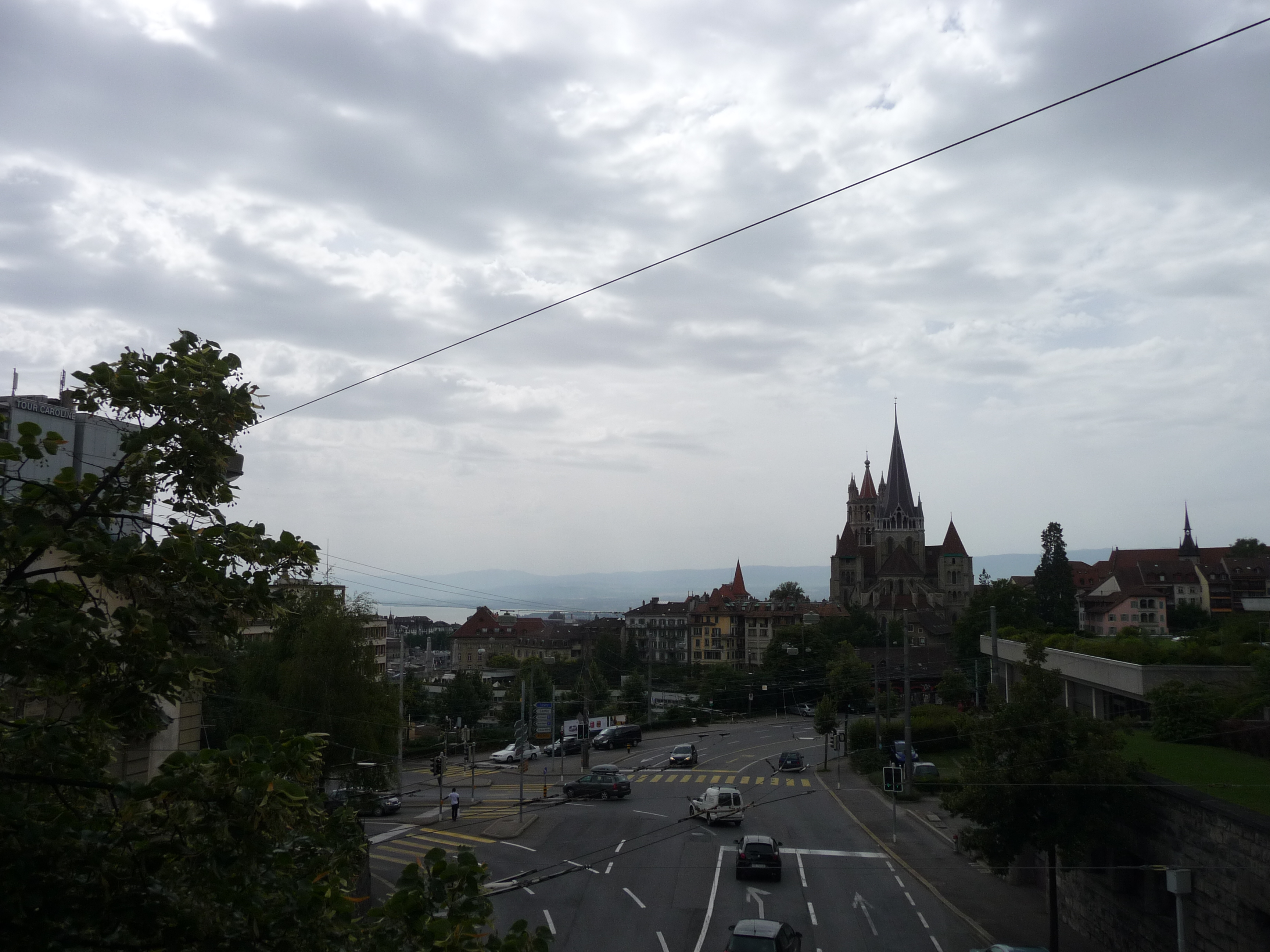 Die Kathedrale Notre-Dame in Lausanne mit dem "Place d'Ours" im Vordergrund